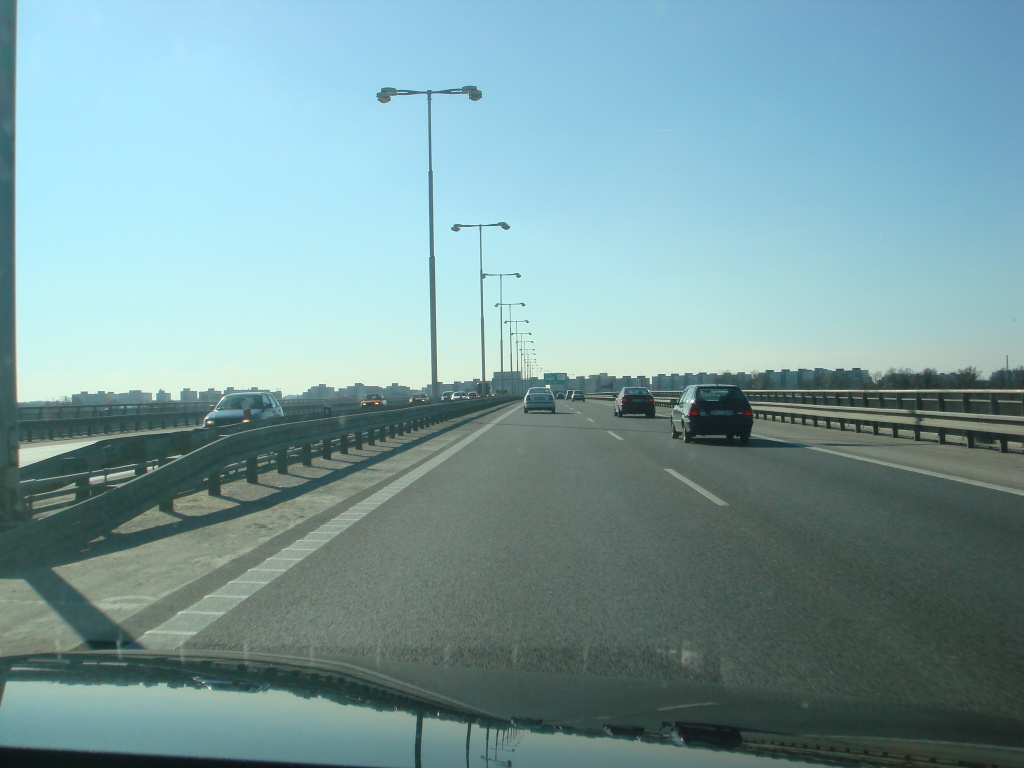 Harbour Bridge (in Slovak: Prístavný most) in Bratislava